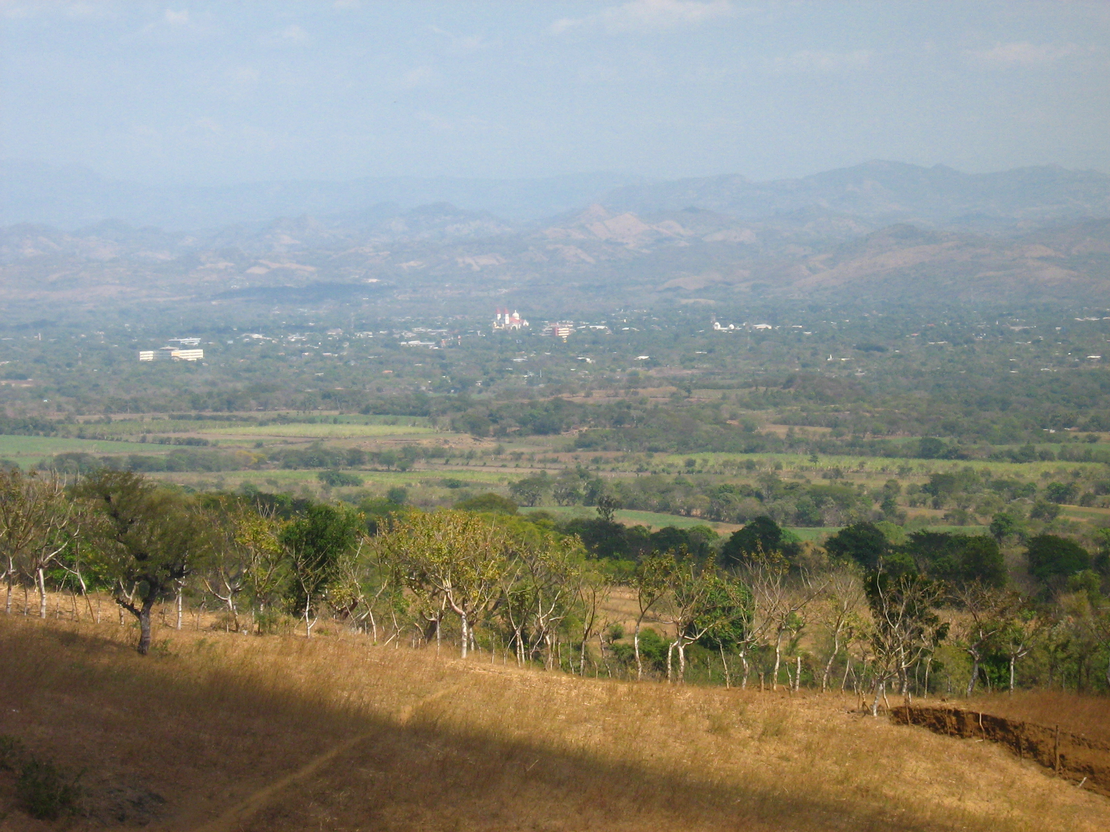 vista de San Miguel, desde el cantón de el San Miguel, El Salvador.